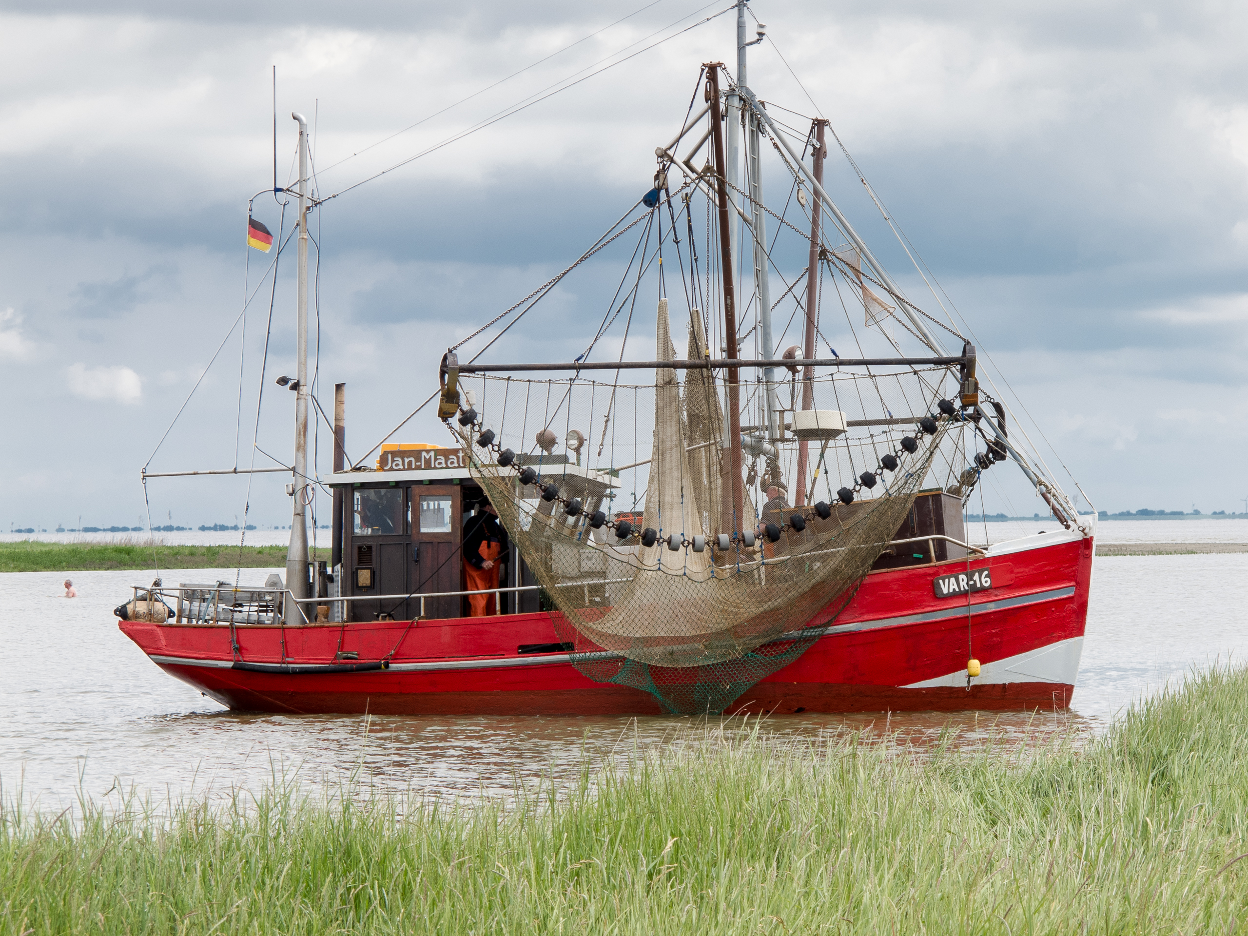 Der Krabbenkutter "Jan Maat" (VAR 16) ist von der Fangfahrt zurückgekommen und holt vor der Vareler Schleuse seine Netze ein.